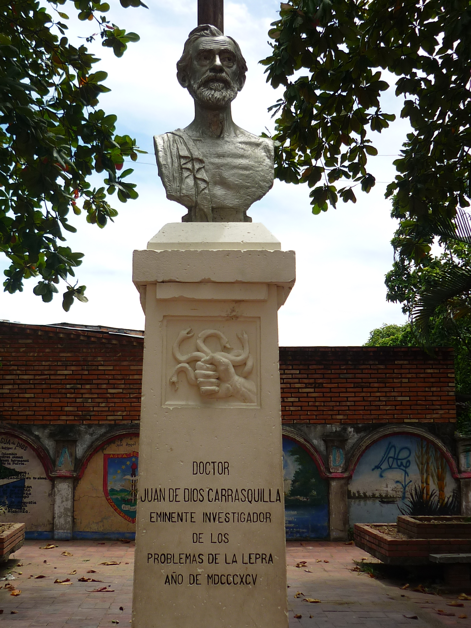 Sanatorio Agua de Dios.Edificio Carrasquilla